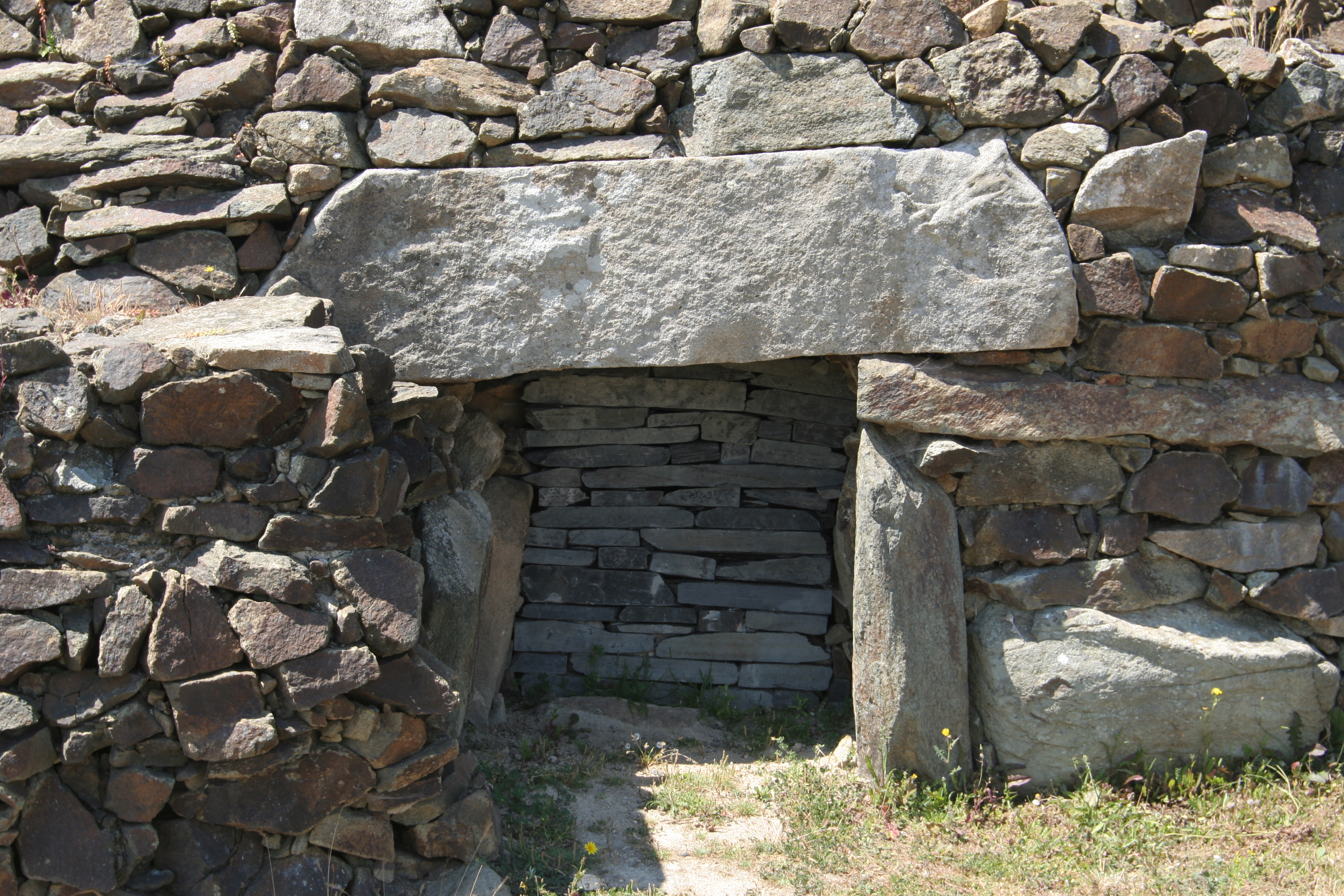 Cairn de Barnenez à Plouezoc'h.